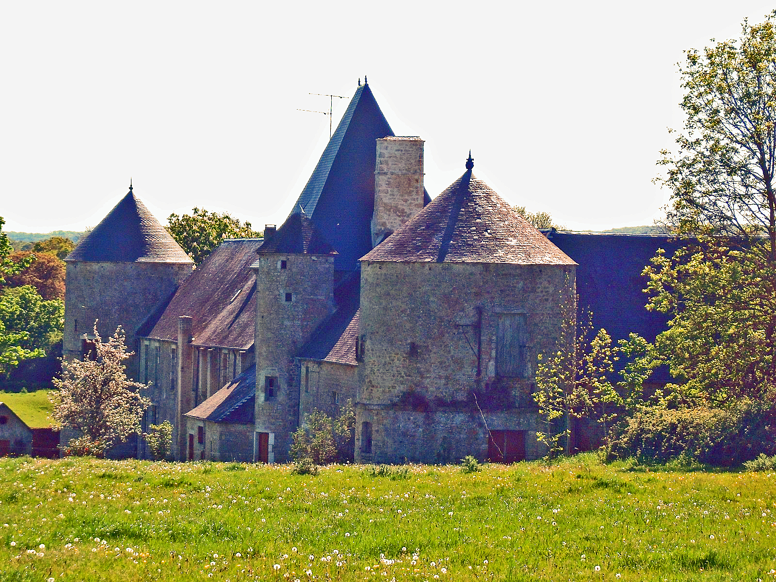 Vieux château de Coigny (Manche, France) .